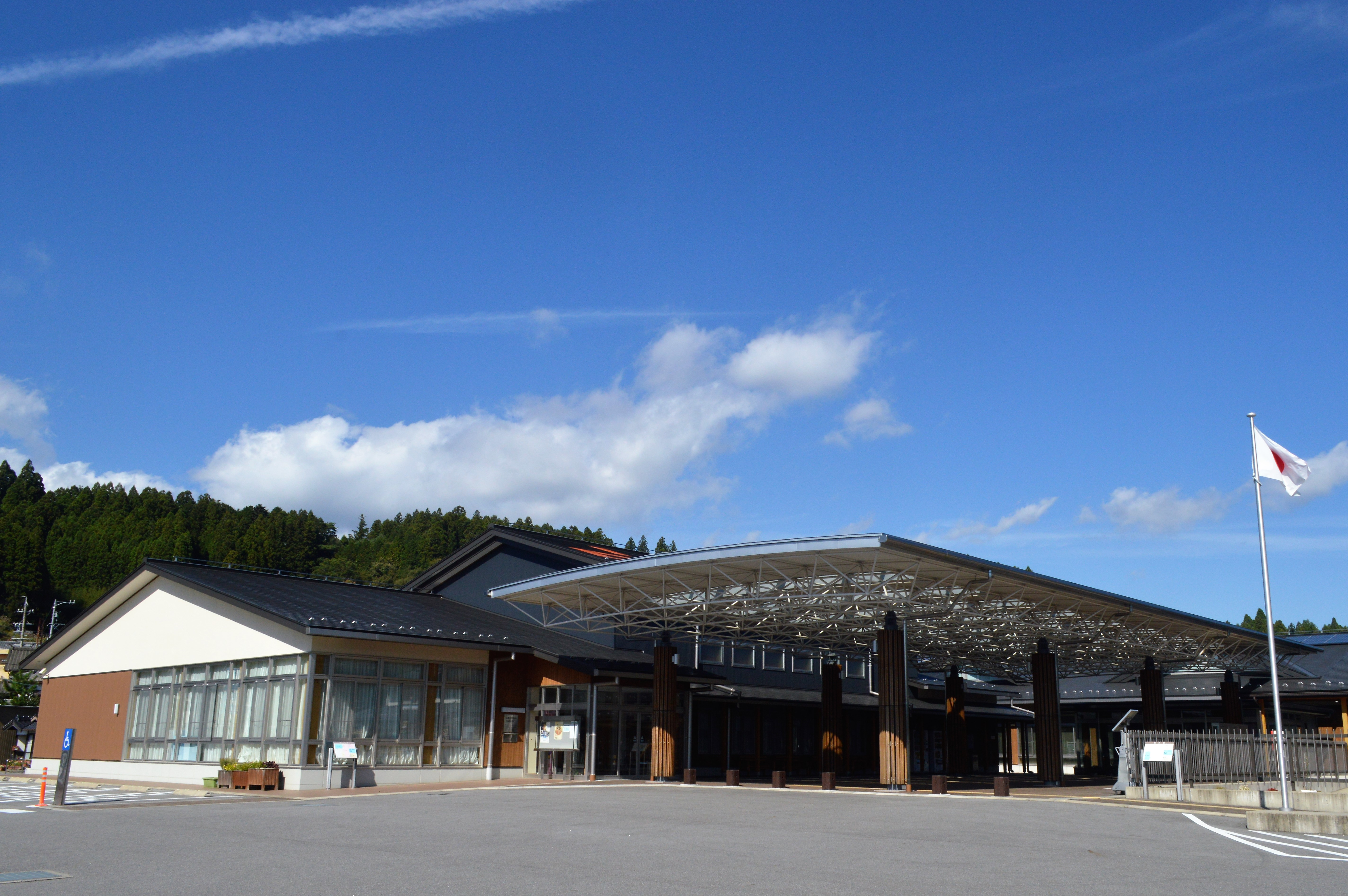 設楽町民図書館などが入る設楽町役場議場・図書館棟。写真中央の壁面が黒い部分が議場であり、写真左側の屋根が低い部分が図書館である。